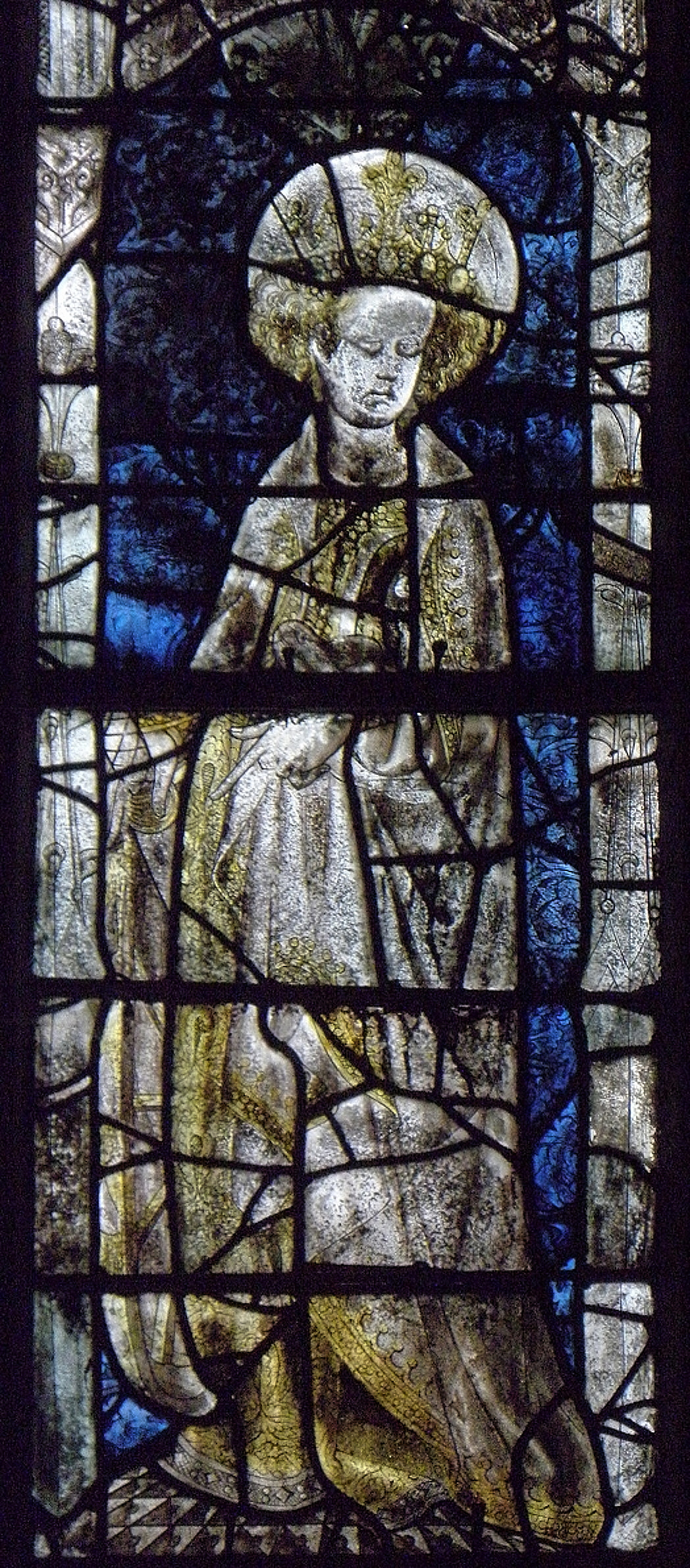 Sainte-Catherine-d'Alexandrie. Maîtresse-vitre de l'église Notre-Dame de Runan (22).